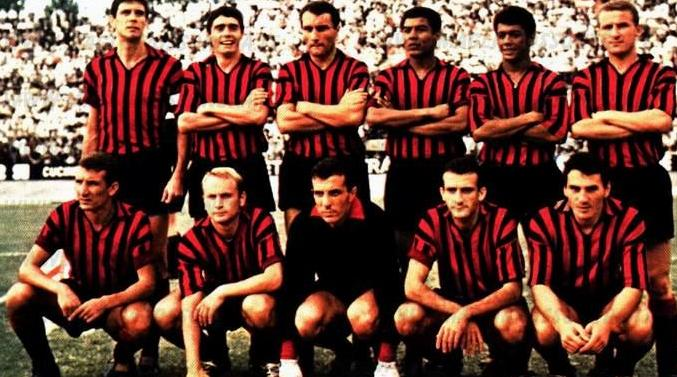 Una formazione del Milan nella stagione 1964-65.